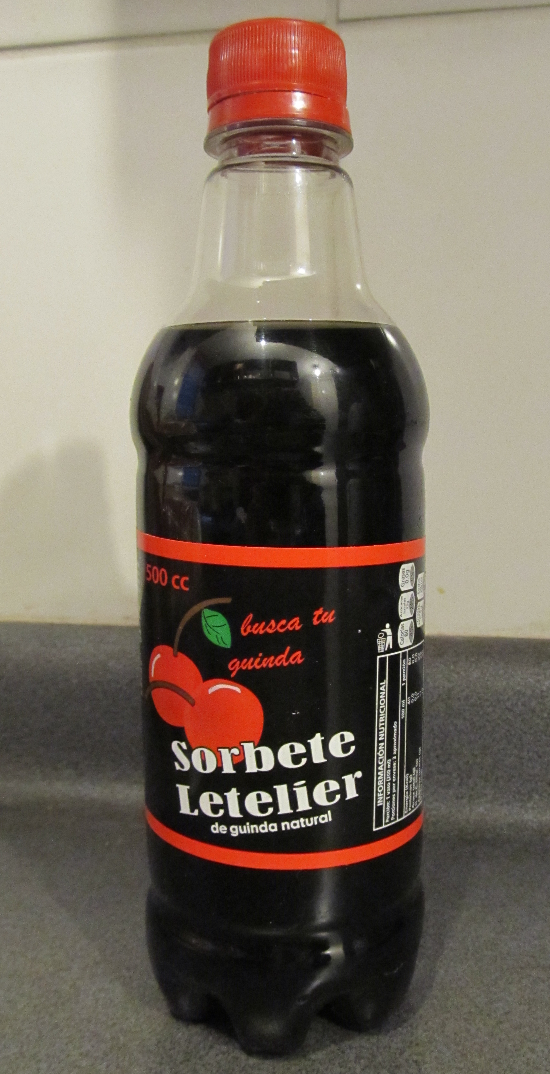 Botella de Sorbete Letelier, refresco chileno.